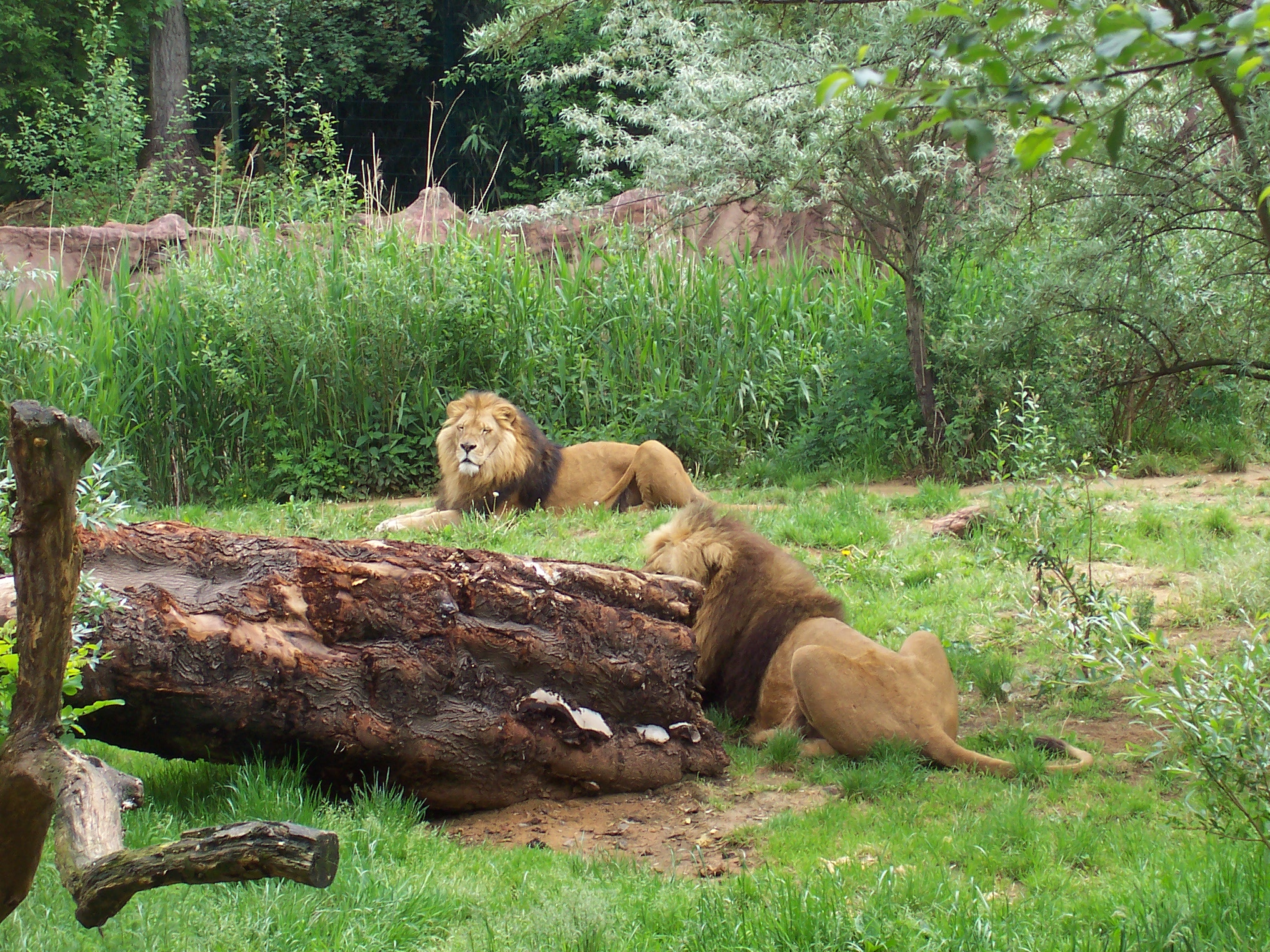 African Lion (Panthera leo) in ZOOM Erlebniswelt, Gelsenkirchen, Germany